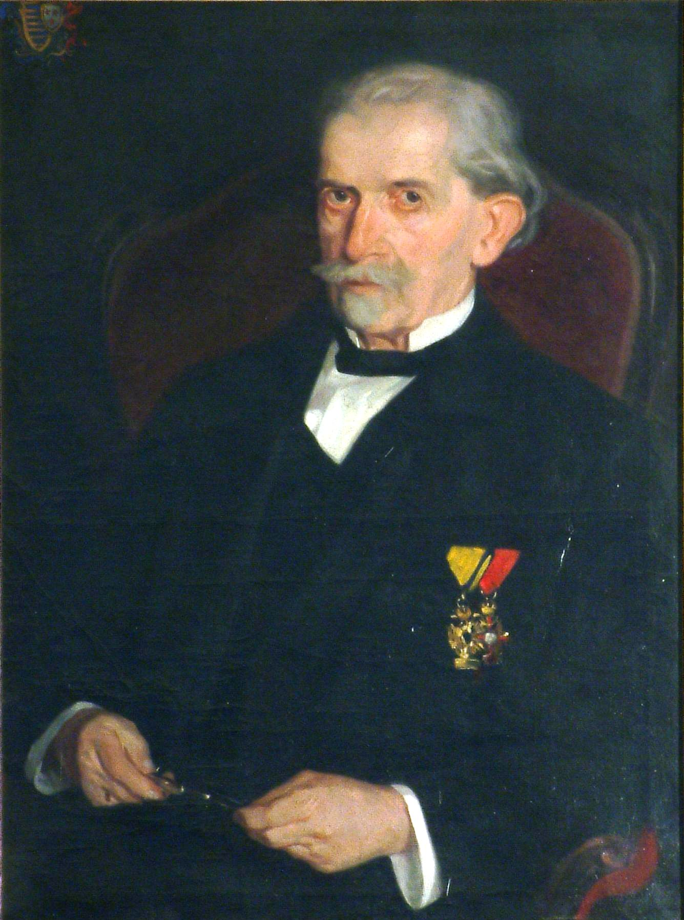 Nádaskay Béla magyar állatorvos és orvosdoktor, a leíró- és tájbonctan tanára.